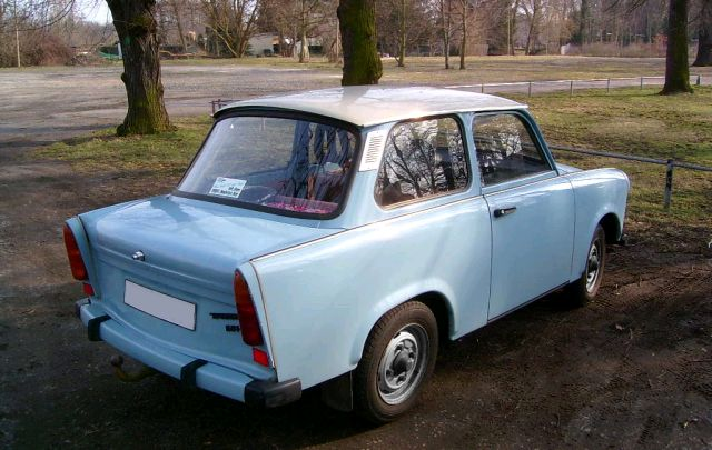 Trabant 601 Limousine Sonderwunsch in gletscherblau und papyrusweißem Dach; Baujahr 1989 (Löschen) (Aktuell) 22:51, 8. Mai 2005 . . Cryzan (Diskussion) . . 640 x 405 (59244 Byte) (Trabant 601 Limousine Sonderwunsch in gletscherblau und papyrusweißem Dach; Baujahr 1989 Fotograf: Christoph Neumann Datum: 12.02.2005 Quelle: Privatarchiv )